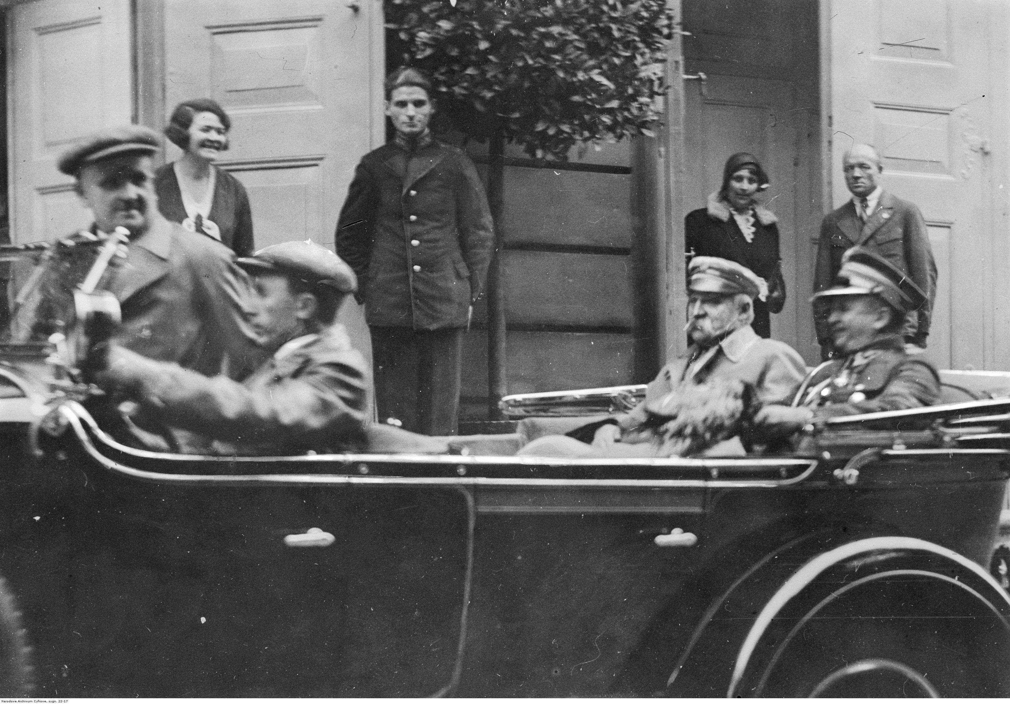 Józef Piłsudski, marszałek Polski - fotografia sytuacyjna w samochodzie, wyjeżdza na przedstawienie w Starej Pomarańczarni w Łazienkach Królewskich w Warszawie.